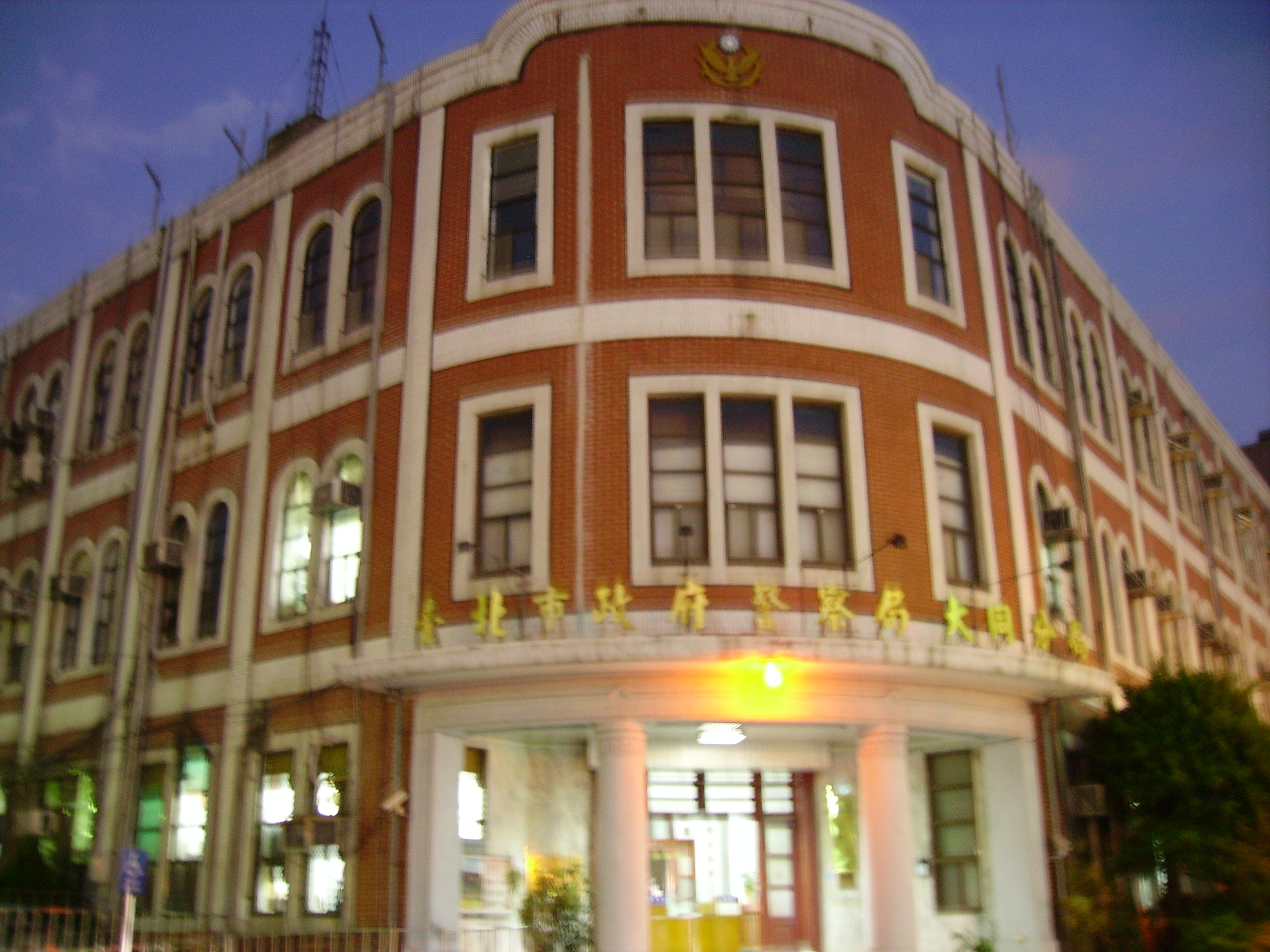 臺北市政府警察局大同分局（原臺北北警察署），地址：臺北市大同區寧夏路89號。